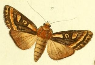 Pl.6-fig.12-Amphia hepialoides Guenee, 1852